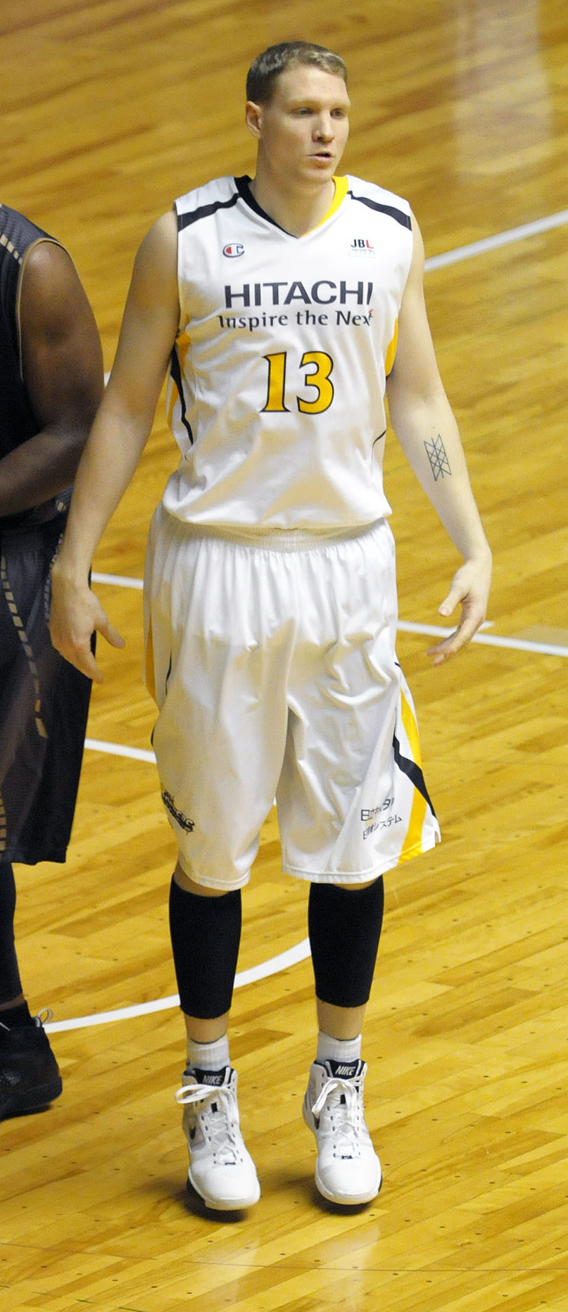 日立サンロッカーズ、クリスチャン・マラカー選手。秋田県立体育館で。